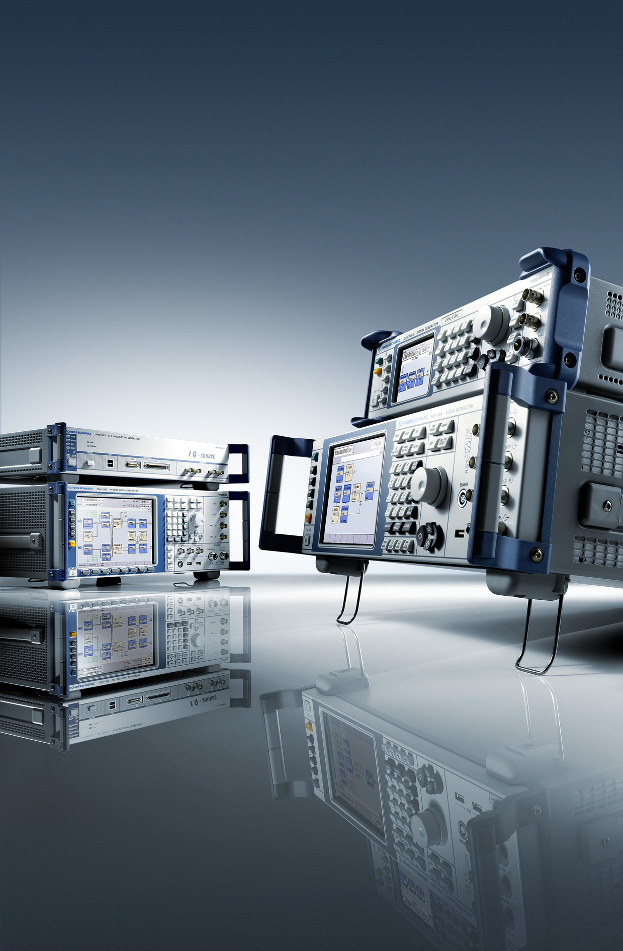 Signalgeneratoren R&S SMB, R&S SMF, R&S AFQ und R&S SMU der Firma Rohde & Schwarz